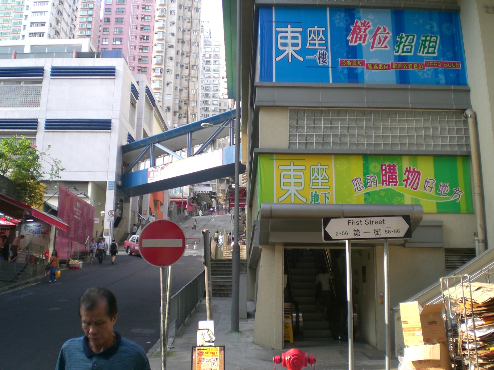 第一街, First Street, Sai Ying Pun, Hong Kong.